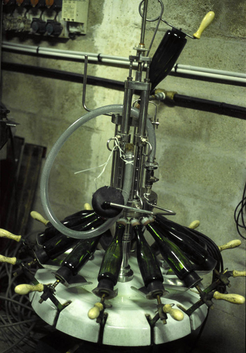 Vorrichtung zur Champagner-Dosage nach dem Degorgieren